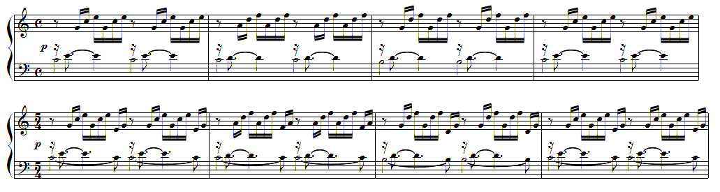 Bach prélude BWV 846 à 5 temps (Alexandre Astier)